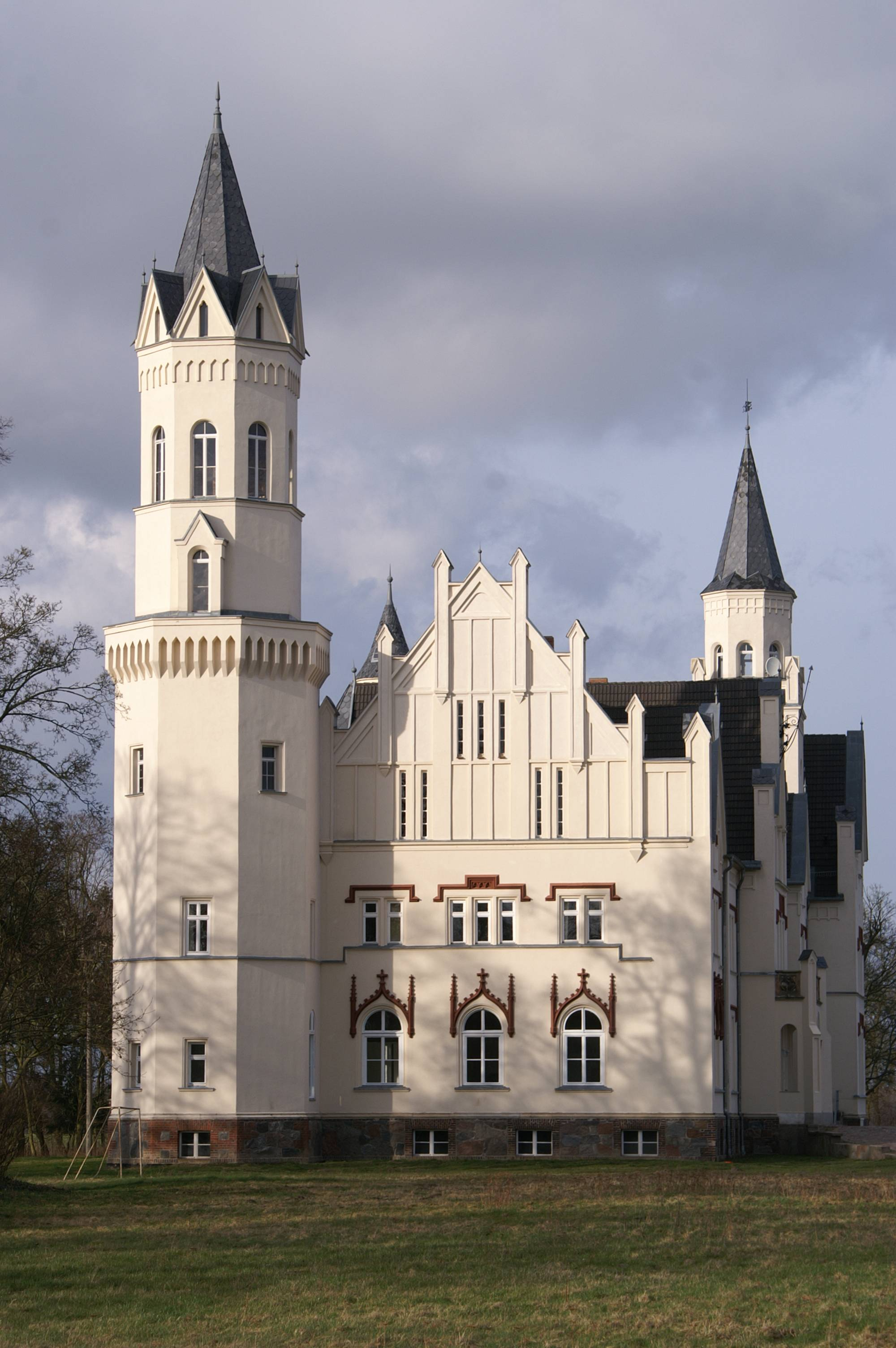 Herrenhaus Kartlow - Südgiebel